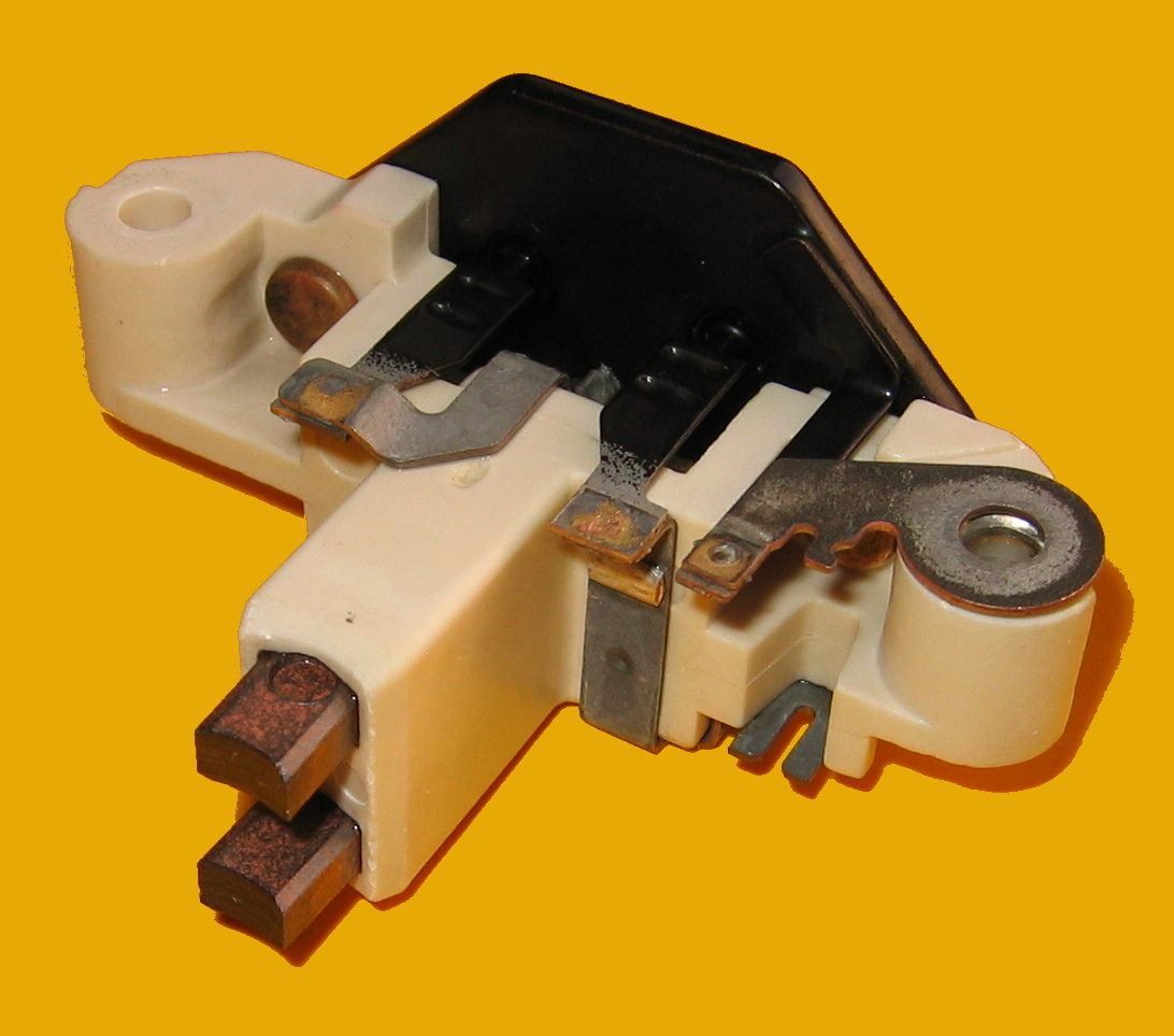 Laderegler einer Lichtmaschine mut Bürsten (2/3 verschlissen) für Erregerwicklung